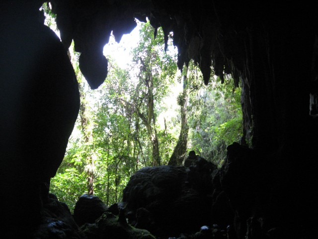 El Nicho, Cuba